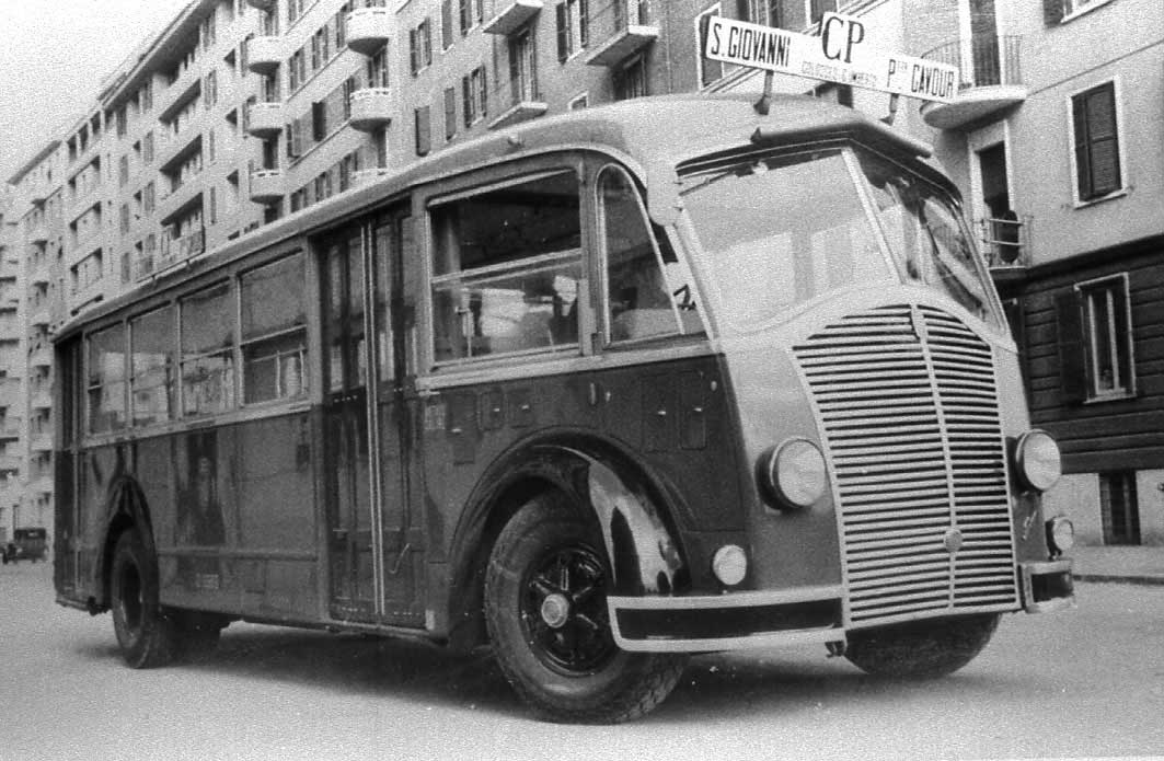 Autobus Fiat 656 della rete urbana di Roma